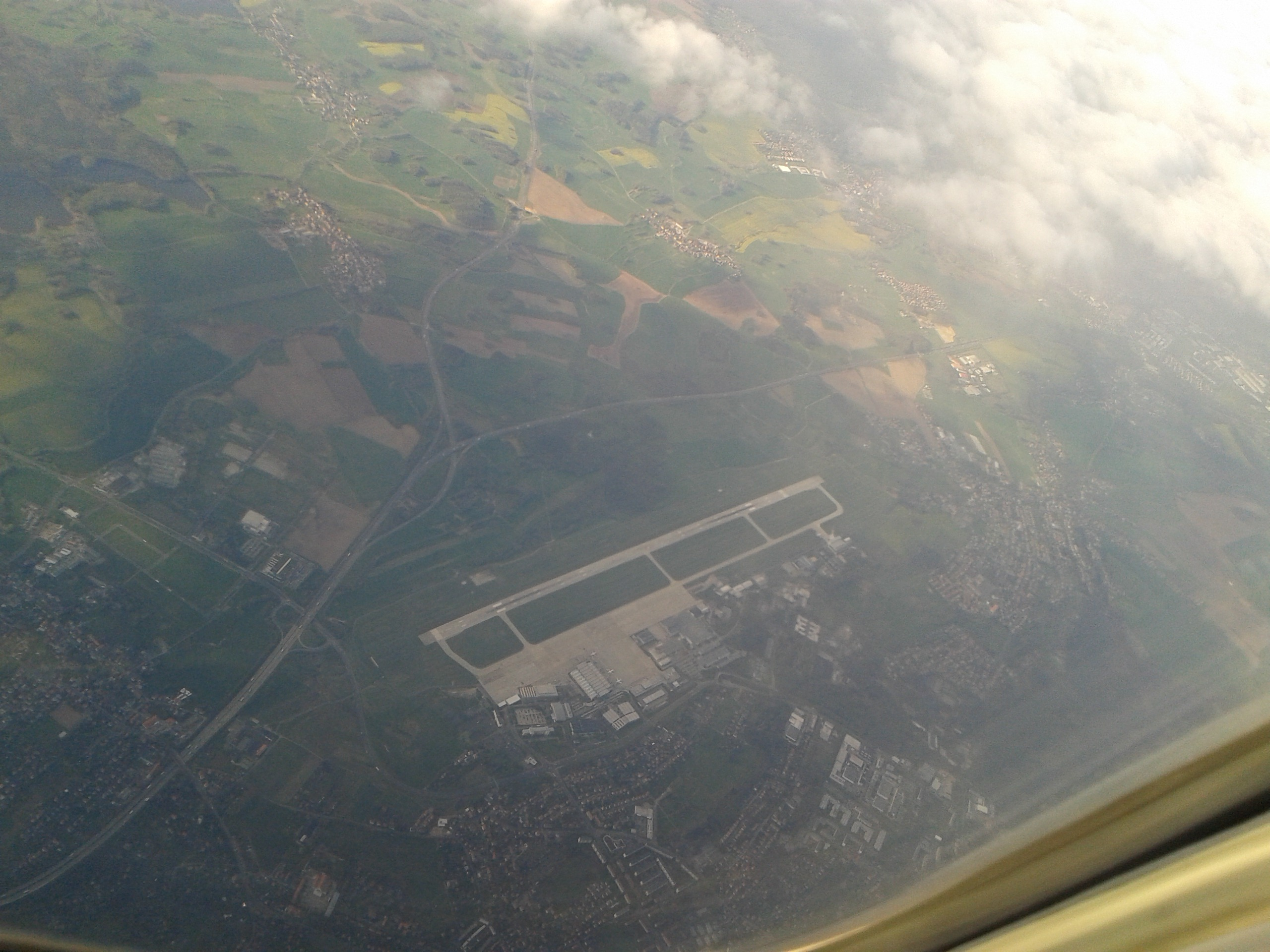 Flughafen Dresden am Autobahndreieck Dresden-Nord von oben